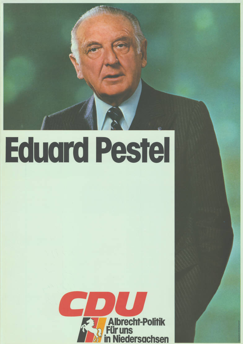 Eduard Pestel CDU Albrecht-Politik Für uns in Niedersachsen Abbildung: Foto - Nationalfarben mit Niedersachsenross Plakatart: Blanko-Motiv-/Ankündigungsplakat Auftraggeber: Verantw.: CDU Niedersachsen Objekt-Signatur: 10-008 : 411 Bestand: Landtagswahlplakate Niedersachsen (10-008) GliederungBestand10-18: Landtagswahlplakate Niedersachsen (10-008) » CDU Lizenz: KAS/ACDP 10-008 : 411 CC-BY-SA 3.0 DE